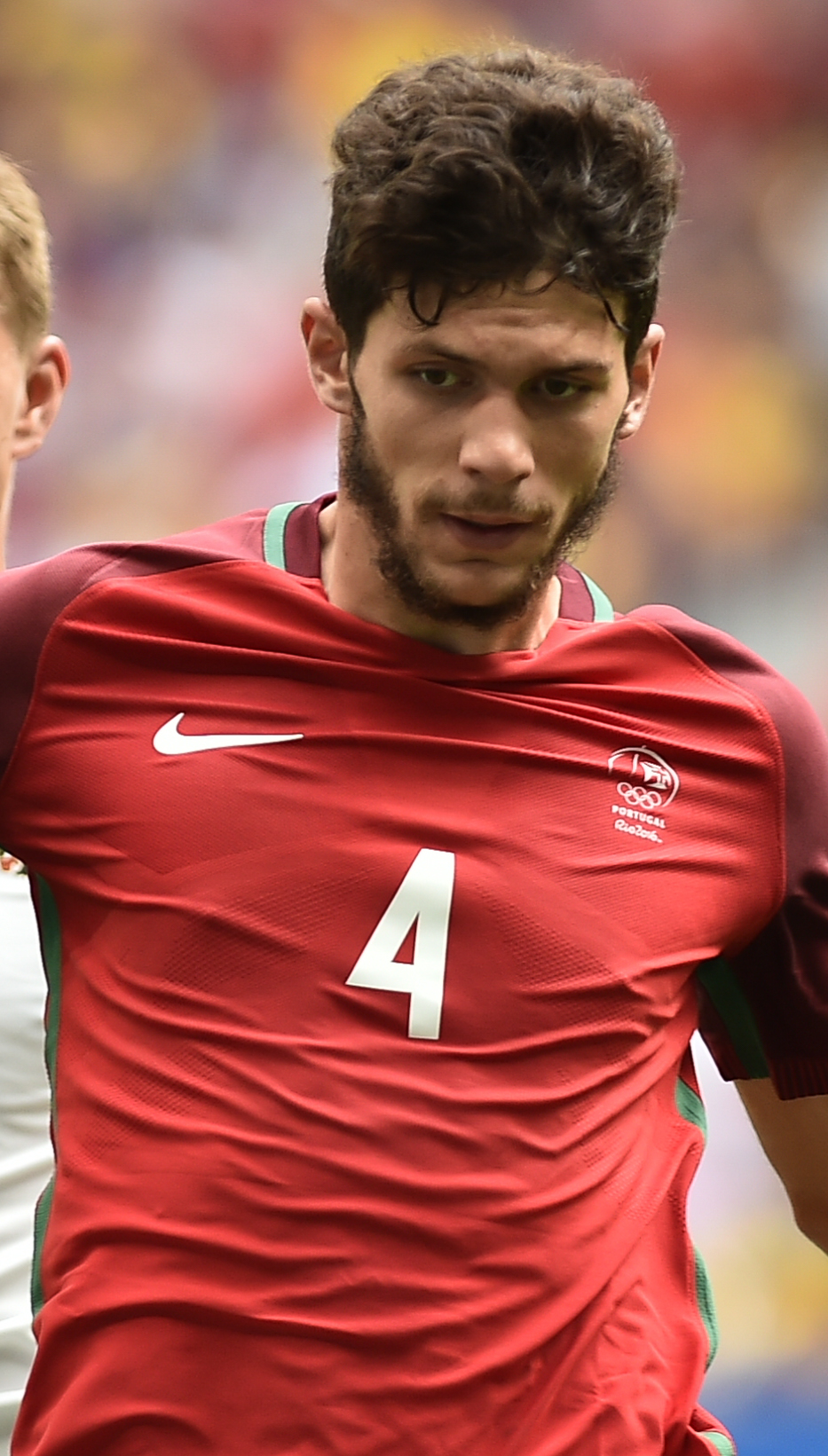 Estádio Nacional de Brasília Mané Garrincha, Brasília, DF, Brasil, 13/8/2016 Foto: Andre Borges/Agência Brasília Portigal e Alemanha jogam neste sábado (12), no Estádio Mané Garrincha, pelas quartas de final do futebol masculino nas Olimpíadas 2016.